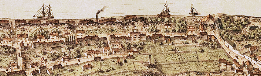 Stadsgårdshamnen, Fjällgatan, Stigbergsgatan på Neuhaus Panorama